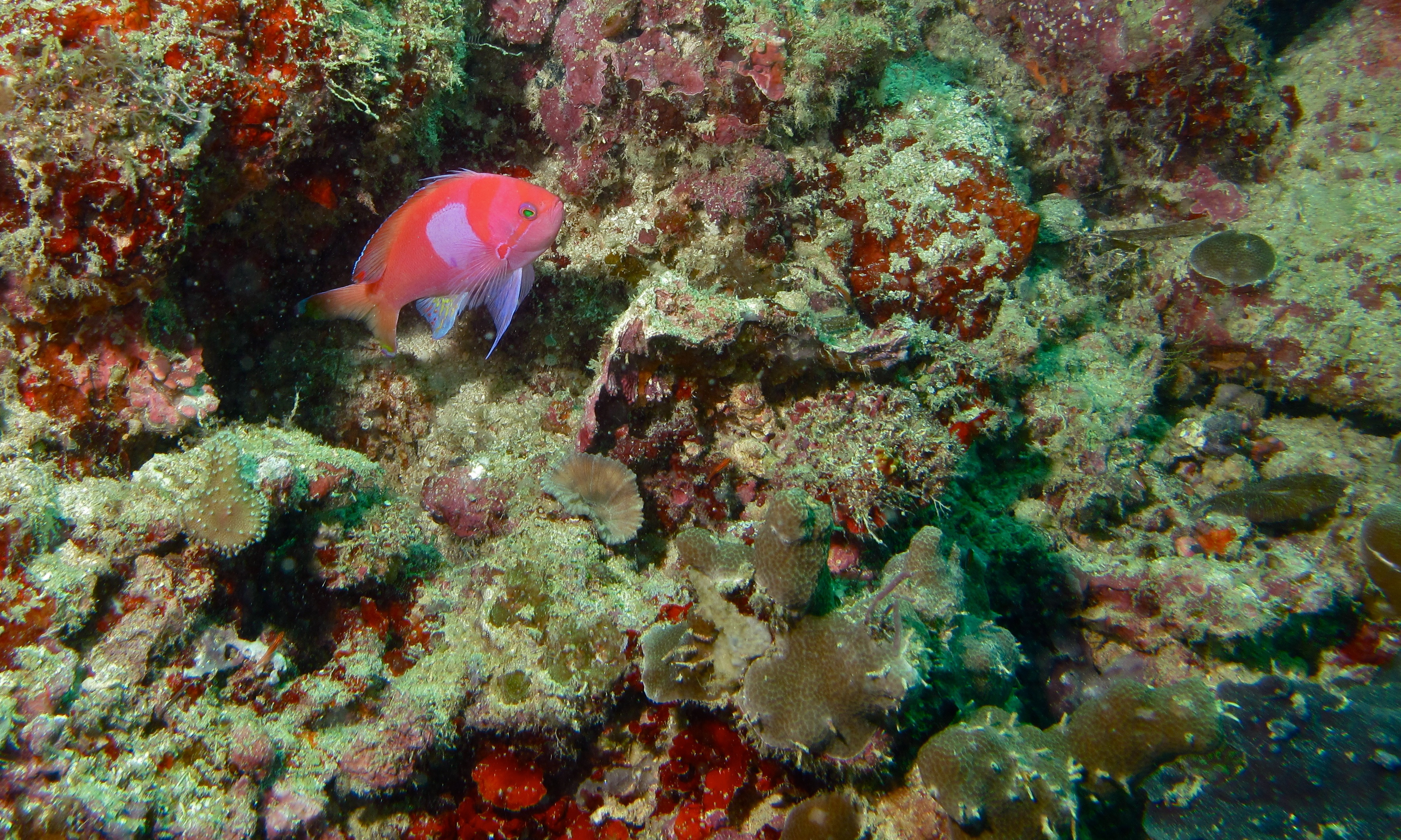 Lobster Reef, Pulau Mabul, Sabah, MALAYSIA